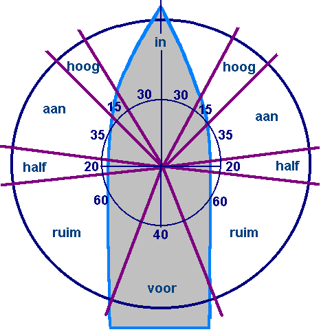 zelf gemaakt zeilkoersen: koers van schip ten opzichte van de wind